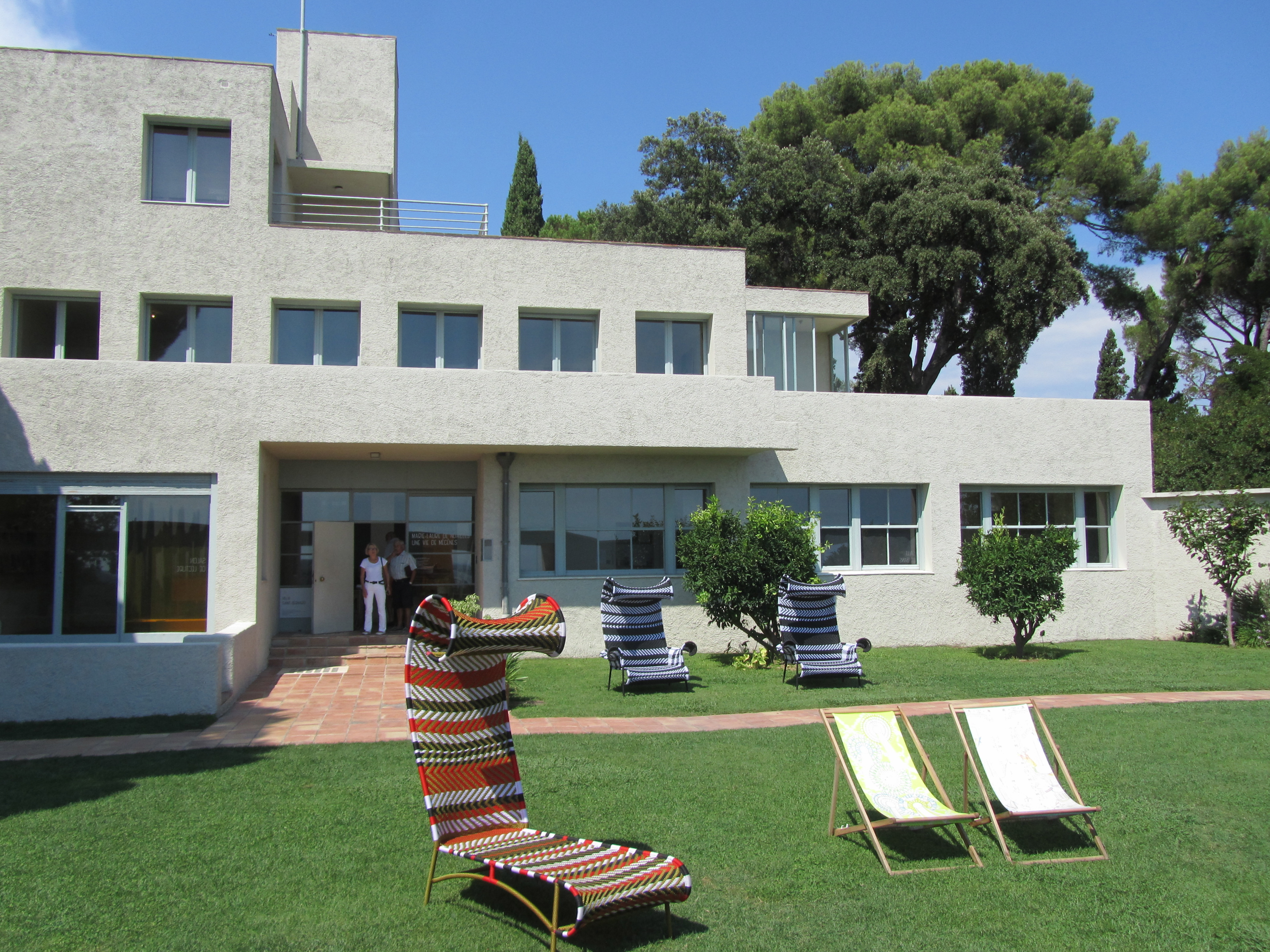 Villa Noailles (InscritInscrit) .